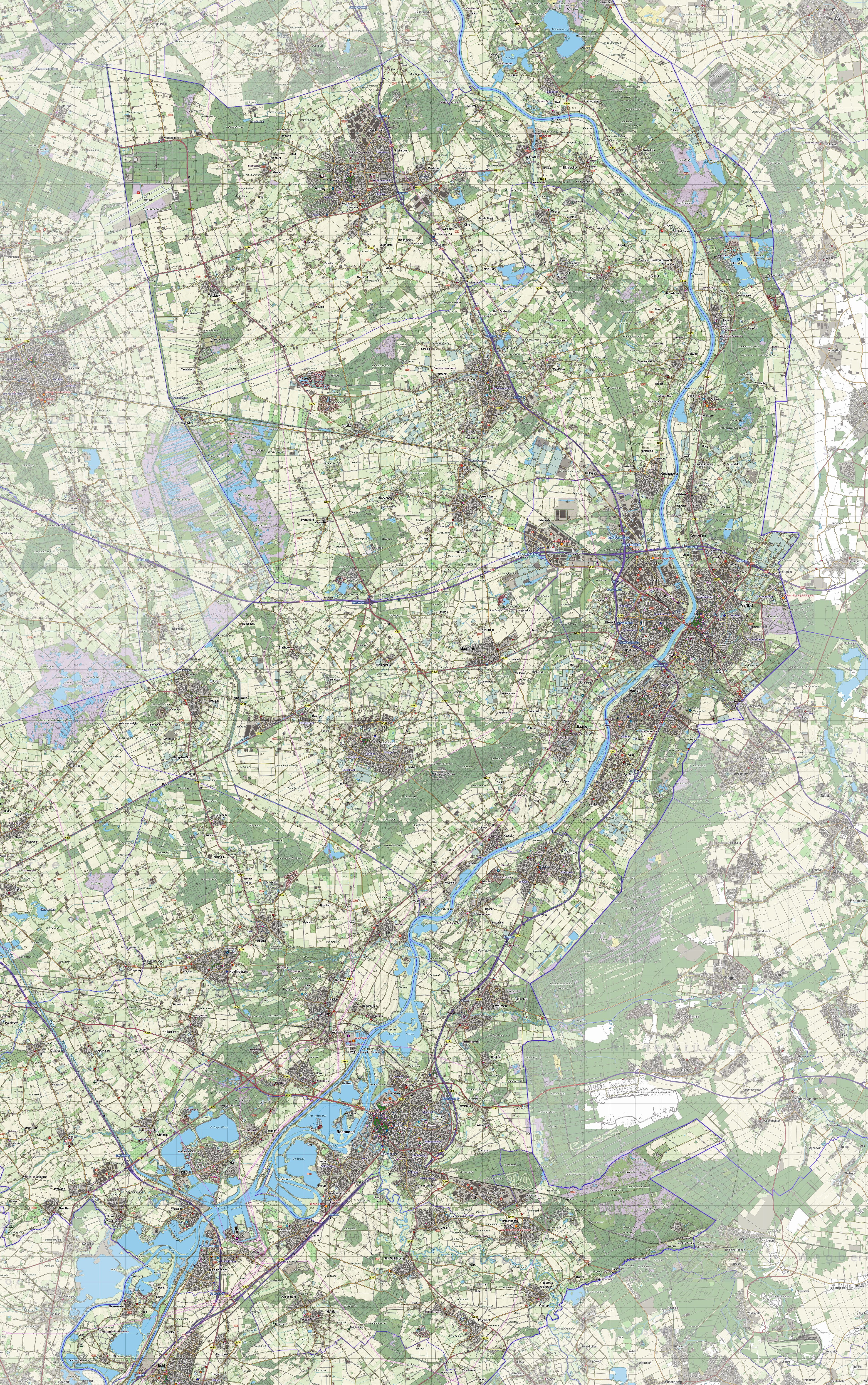 Detail van een topografische kaart van de provincie Limburg (2013). Op basis van de GML open geodata van de BRT/Top10NL (basisregistratie Topografie, Kadaster 2011), vrijgegeven door Kadaster onder de Creative Commons BY licentie. Additionele gegevens uit BAG en uit de Risicokaart. Samenstelling en kleurenschema: Jan-Willem van Aalst, met QuantumGIS en Photoshop. Zie ook de Legenda.